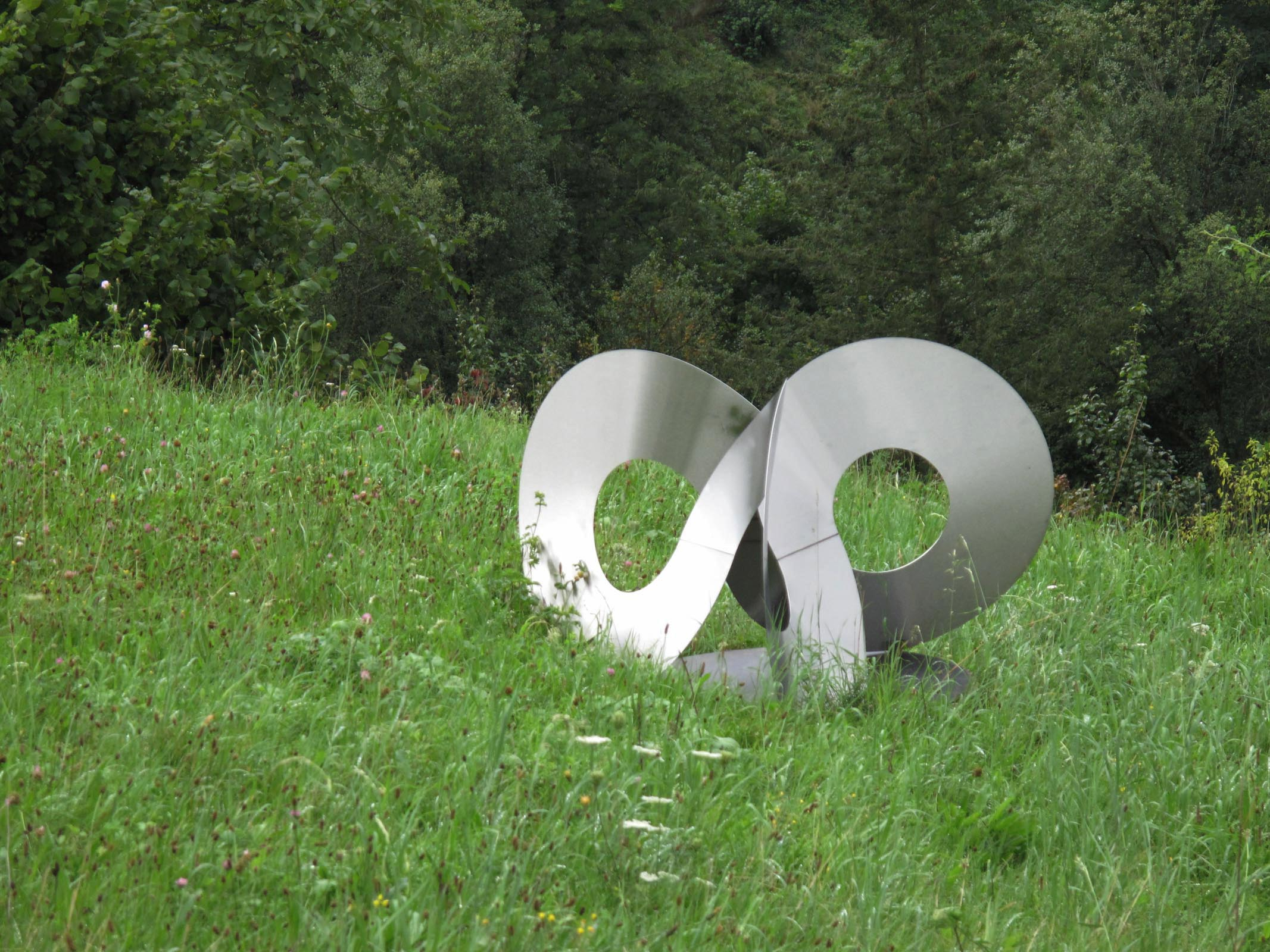 Roland Phleps, "Unendliche Schleife", 1993, H: 110 cm - Deutschland, Baden-Württemberg, Freiburg im Breisgau, Skulpturenwiese am Waltersberg